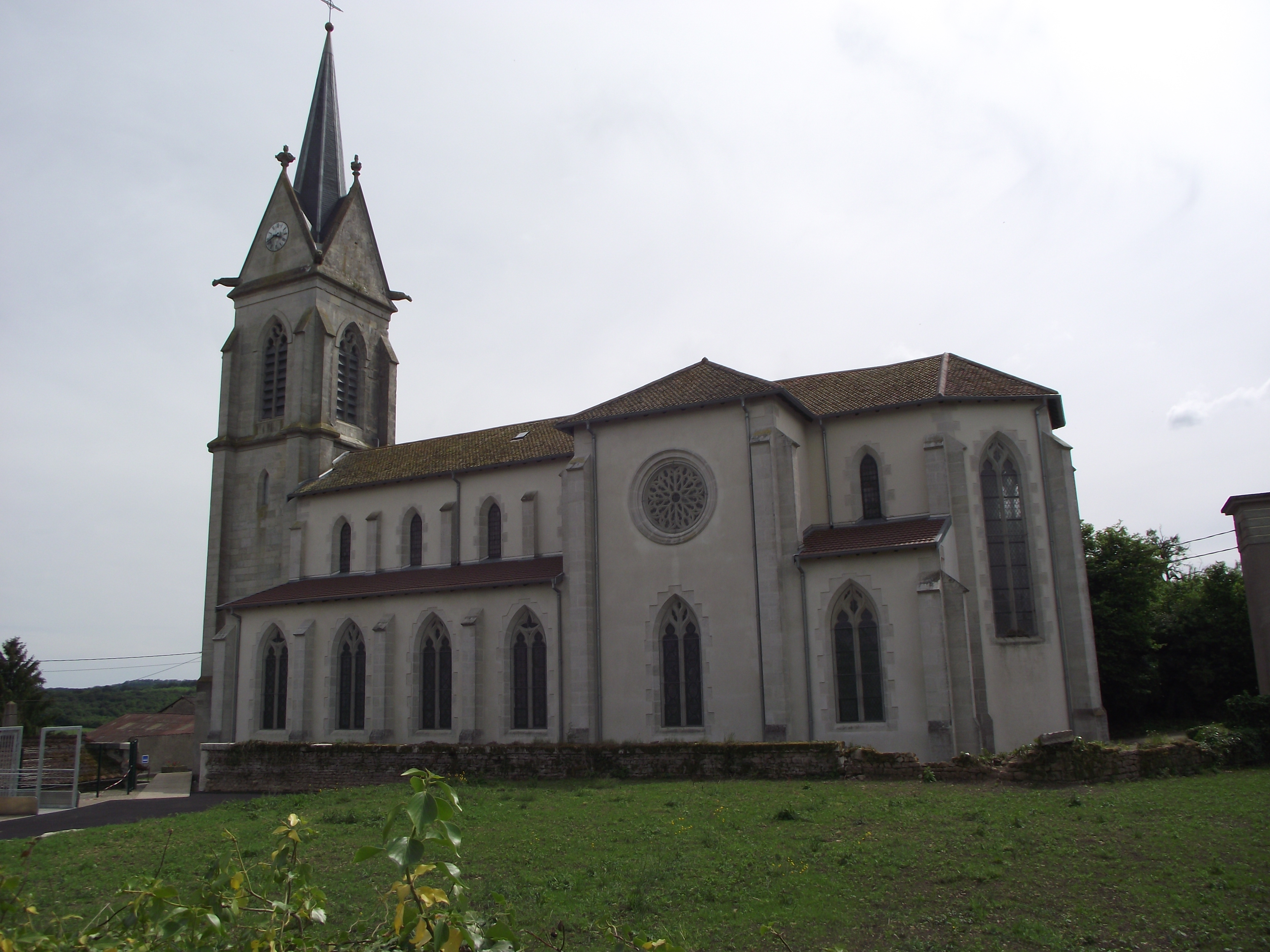 Église Saint Evre à Tranqueville (vue de coté)